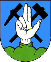 Dawny herb Boguszowa